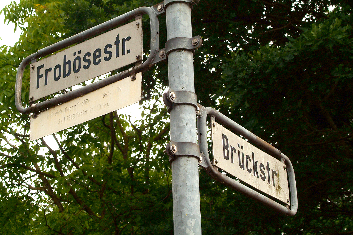 Straßenschilder Brückstraße und Frobösestraße in Hannover-Döhren mit Infotafel:Heinrich Georg Froböse, um 1642-1704, seit 1673 Pastor in Döhren ...